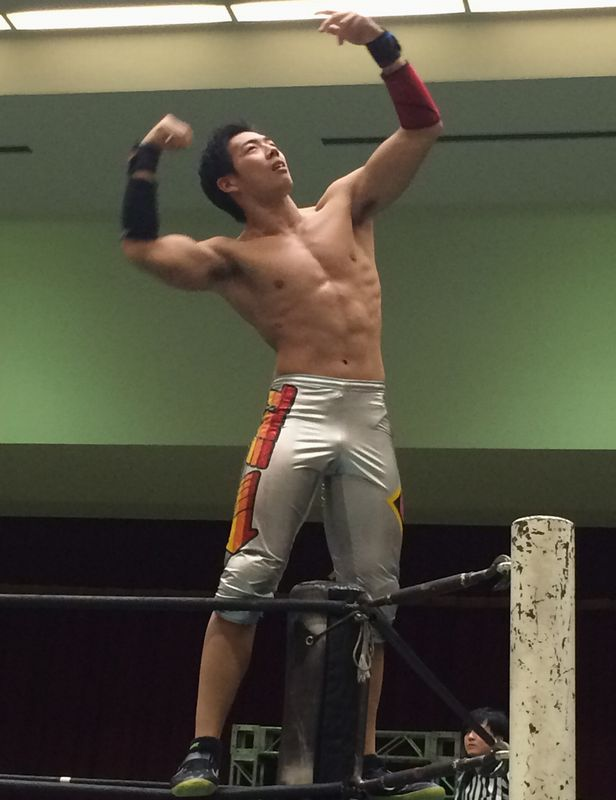 天王寺にて